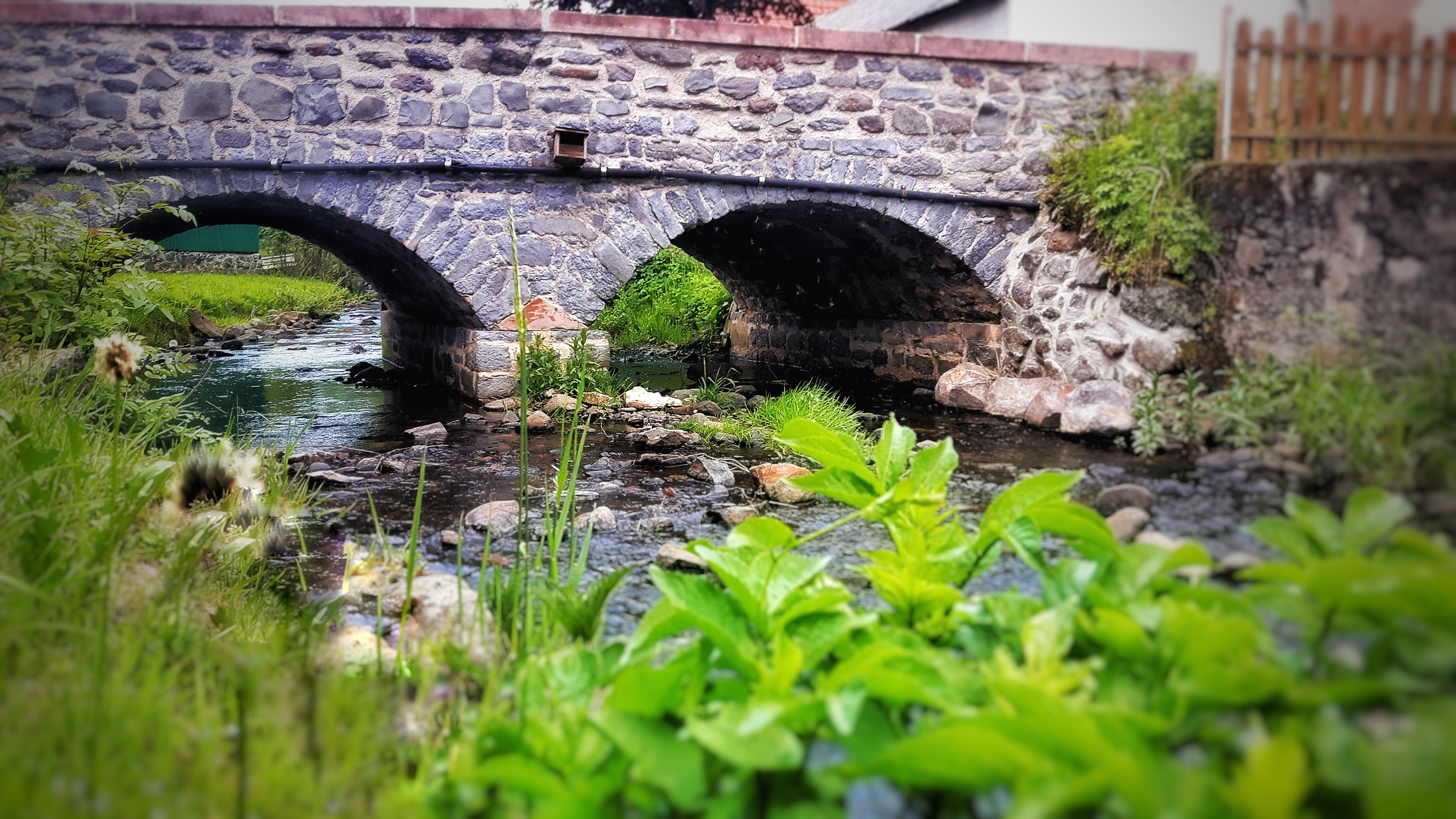 Auf dem Bild zu sehen ist die Unterdorfbrücke in Schotten-Burkhards